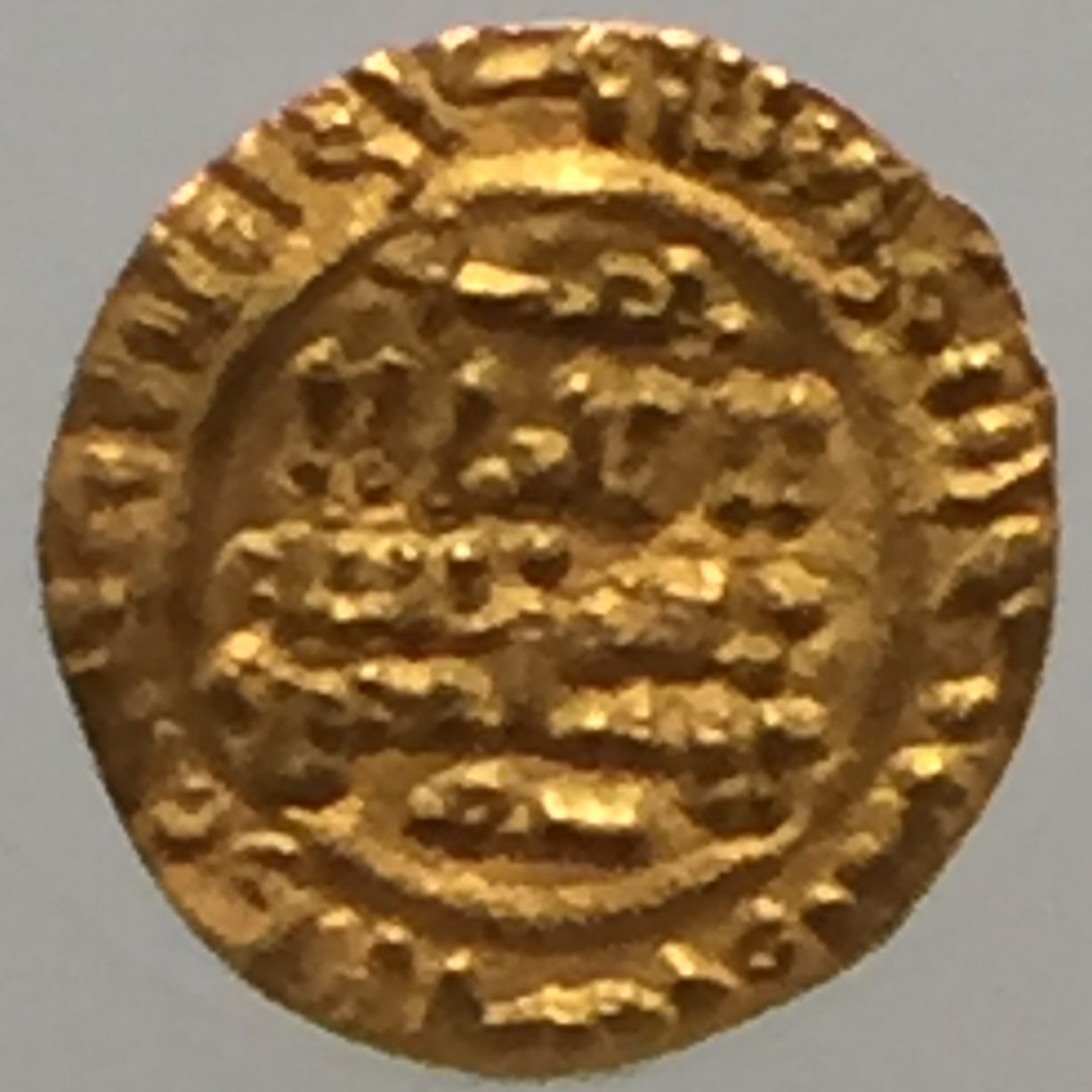 Moneda de plata denominada "mancuso" acuñada por el conde Ramón Berenguer de Barcelona (1035-1076). La moneda muestra una leyenda en árabe. Colección del Museo do Dinheiro de Lisboa.